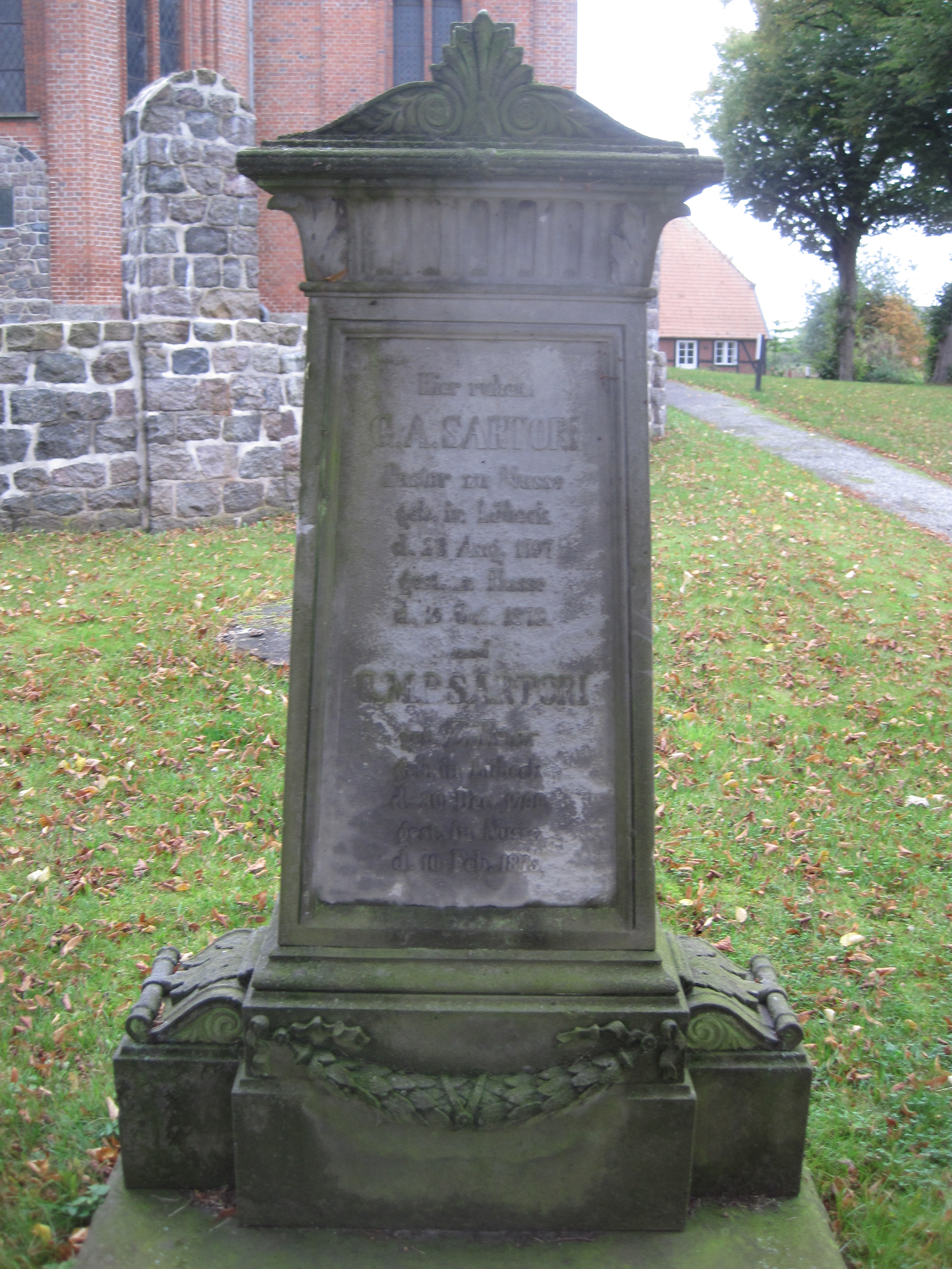 Kirche in Nusse, Grabstein des Pastors Gottfried Andreas Sartori (1797–1873), Kirchhof